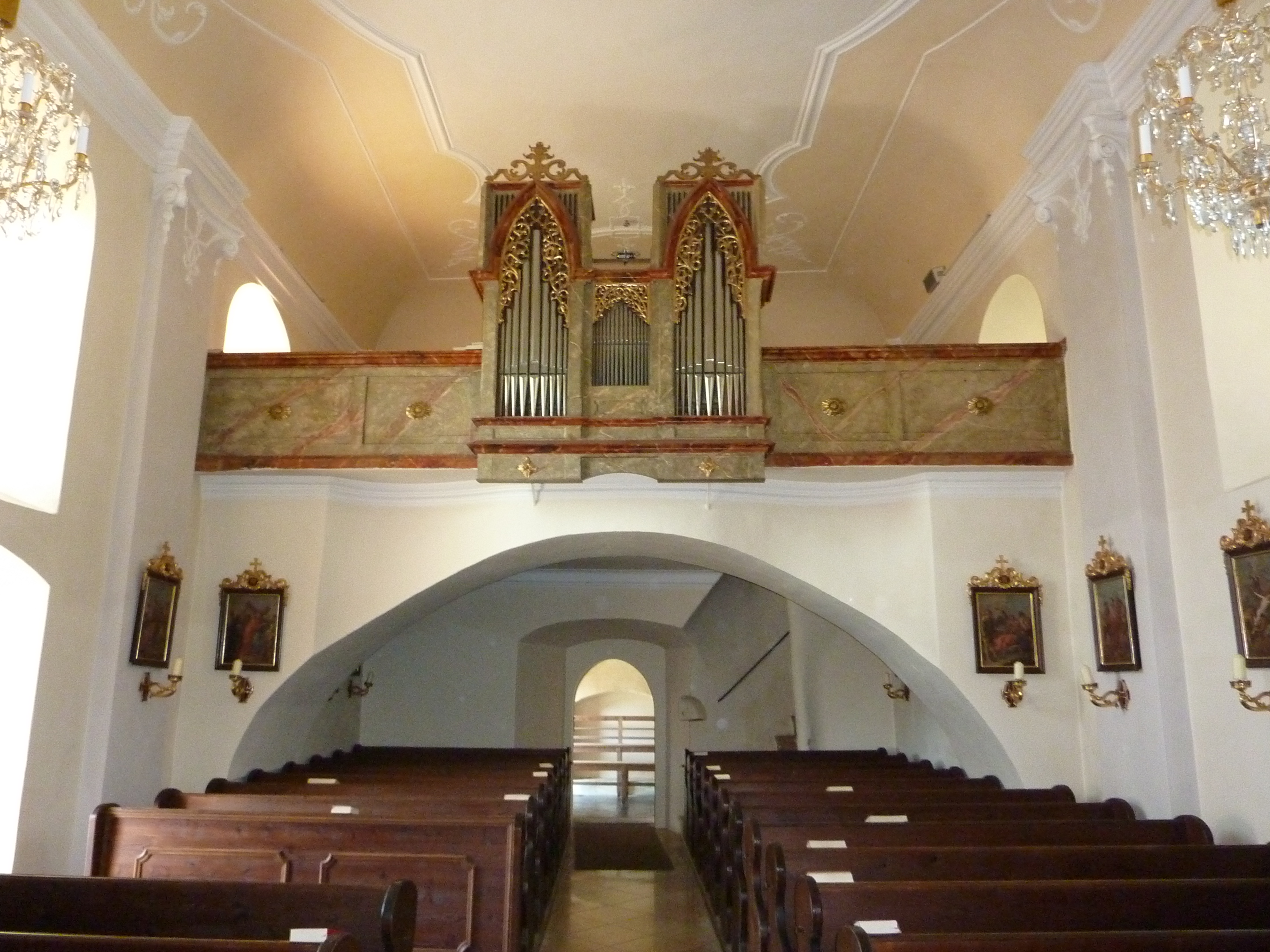 Pfarrkirche Els, Albrechtsberg an der Großen Krems, Niederösterreich - Orgel von Josef Breinbauer 1879